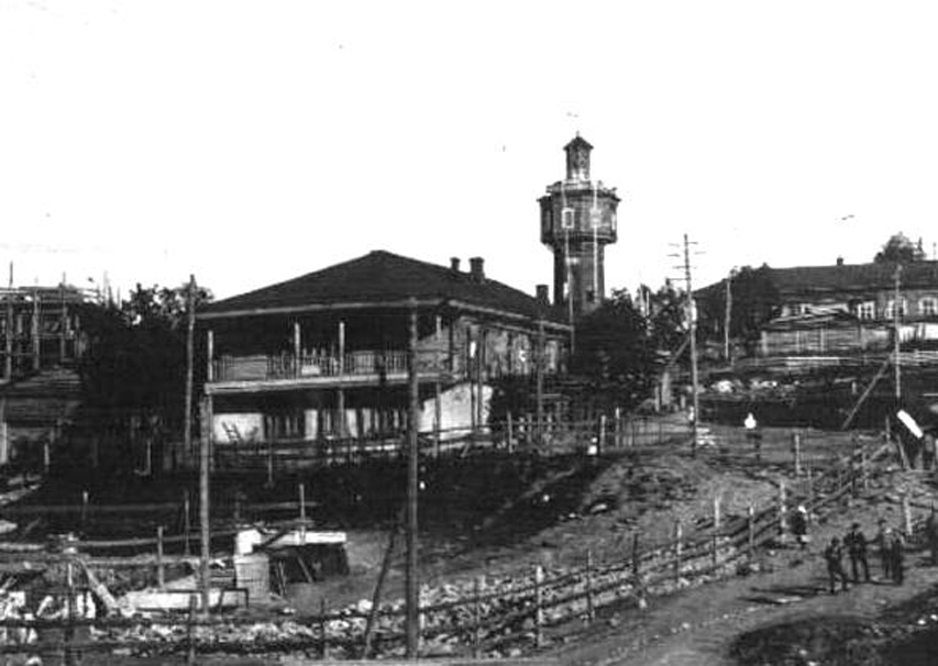 Башкортостан. Белорецк. Здание заводской конторы